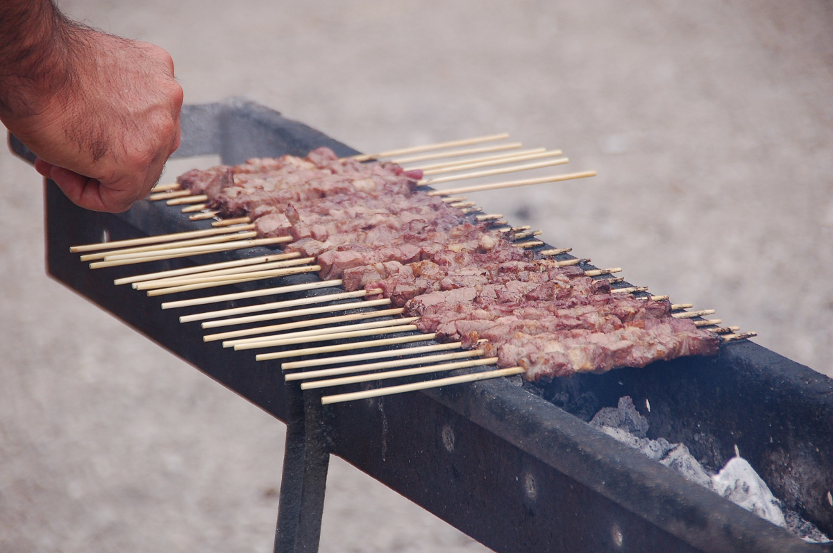 Arrosticini am Campo Imperatore